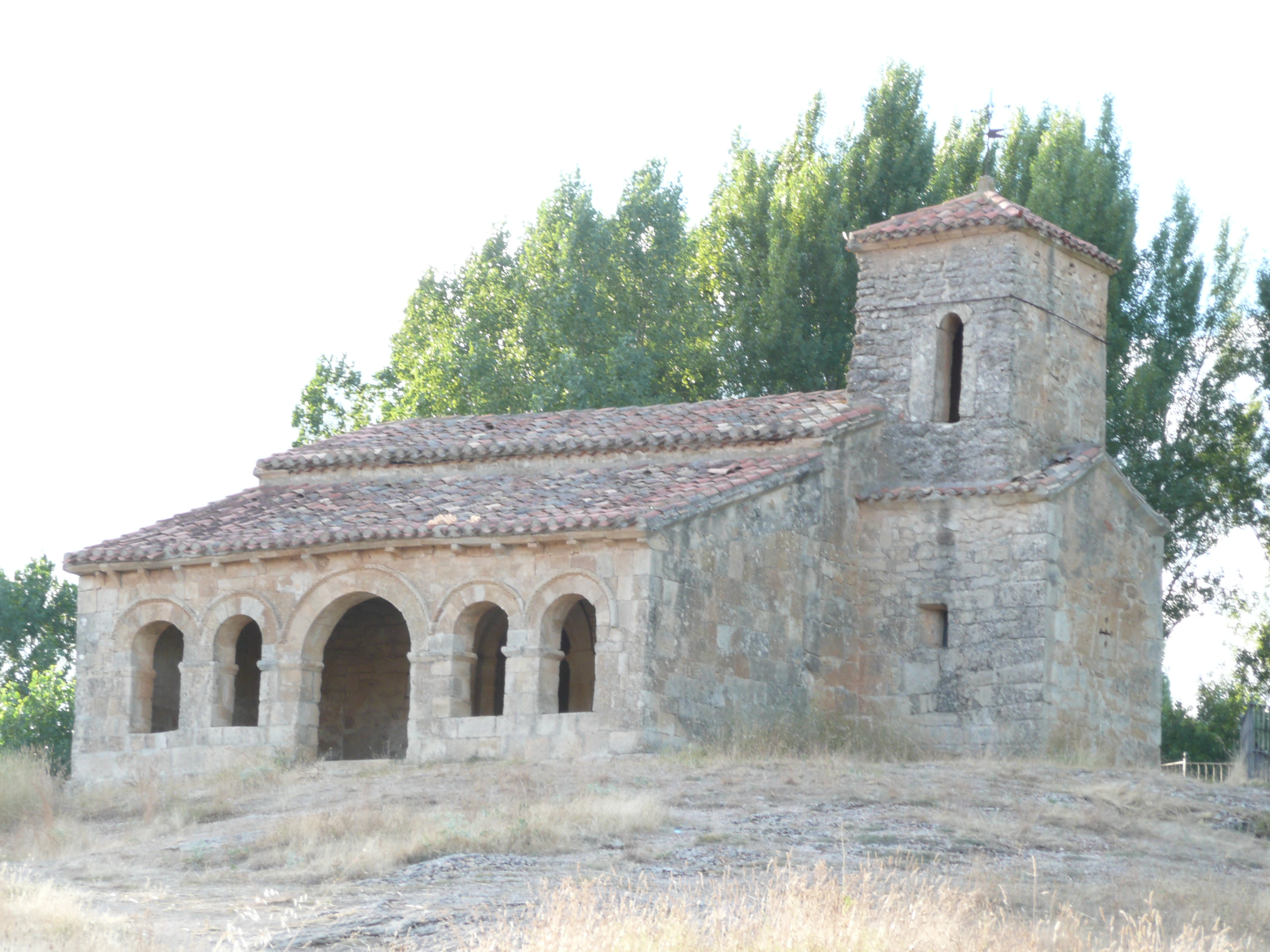 panorámica de la Ermita de Santa Cecilia Barriosuso(Burgos)